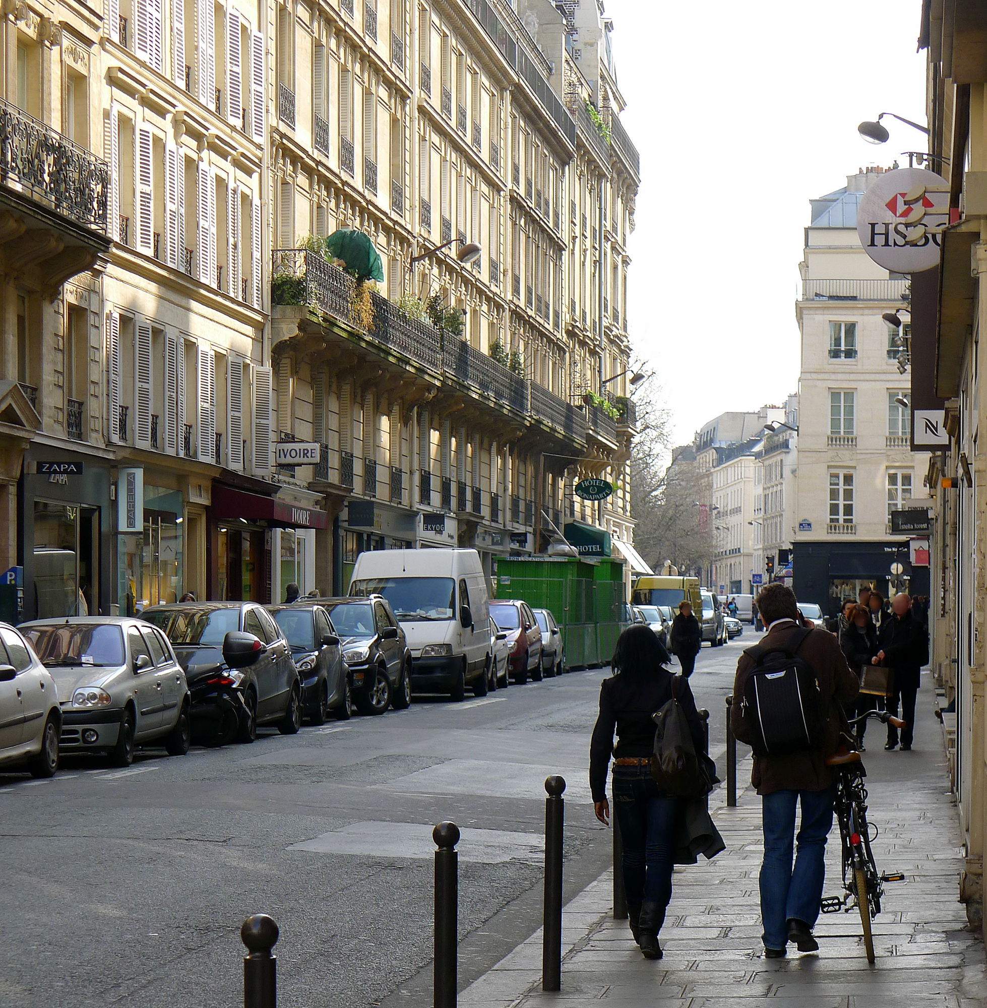 Rue Bonaparte - Paris VI